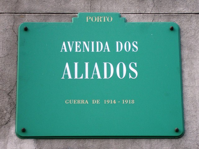 "Aliados" avenue street sign in Porto, Portugal. Author: Manuel de Sousa.